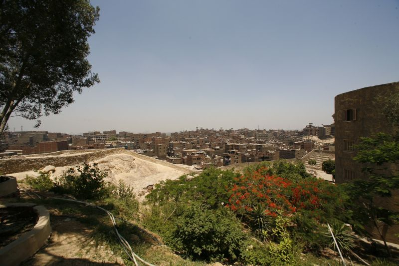 Город мусорщиков. Каир. Египет. Общий вид сверху. "City" of garbage collectors in Cairo